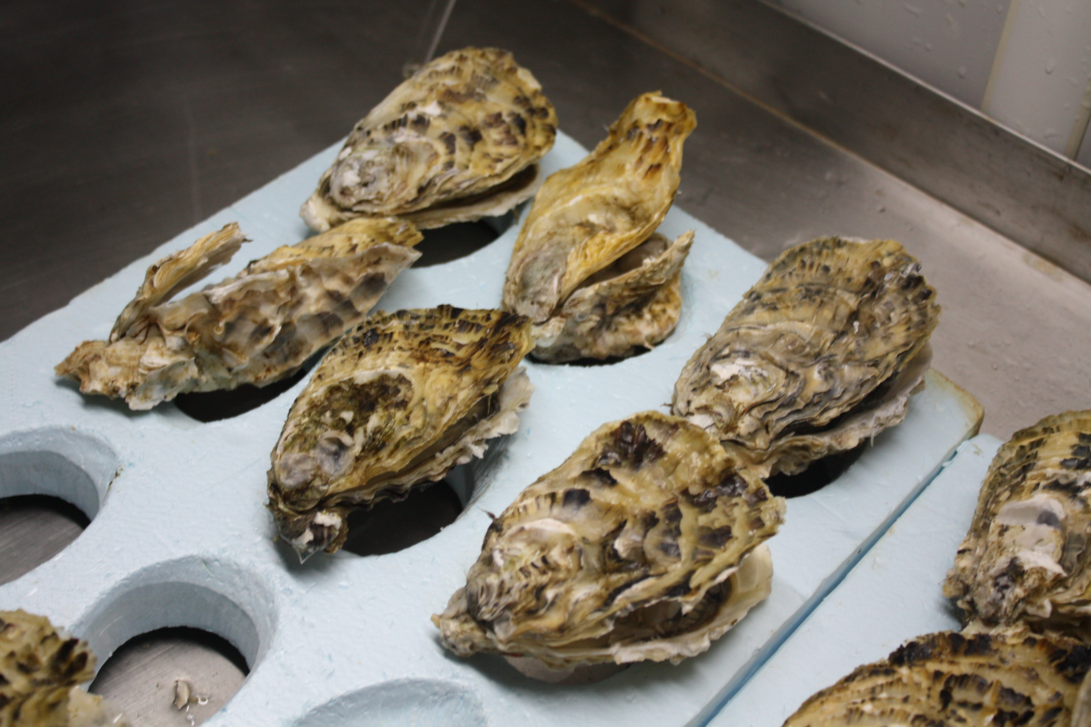 Varios exemplares de ostra portuguesa (Crassostrea gigas)